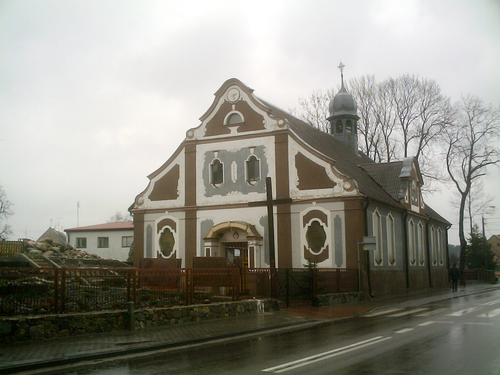 Kościół Najświętszego Serca Pana Jezusa w Orzyszu